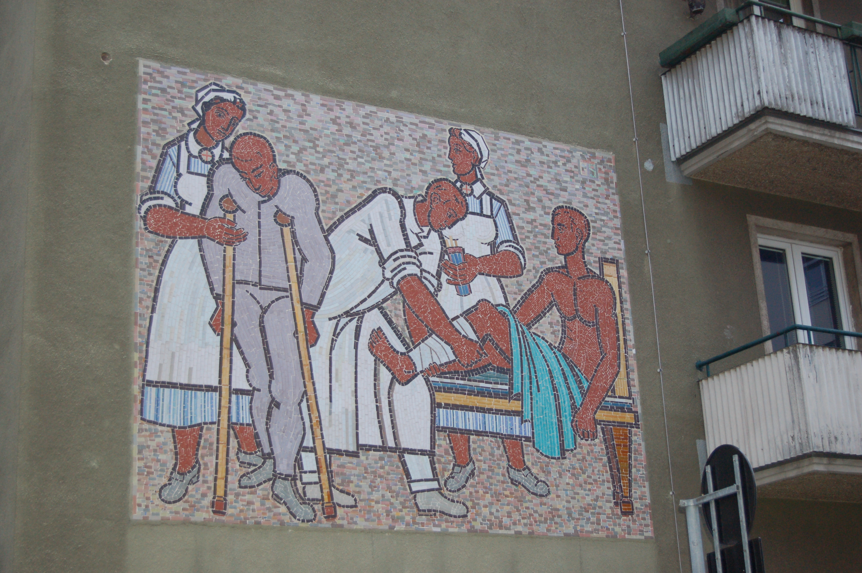 Der Fleming-Hof in Wien-Ottakring (Josef-Weinheber-Platz 6-10). Wandmosaik.